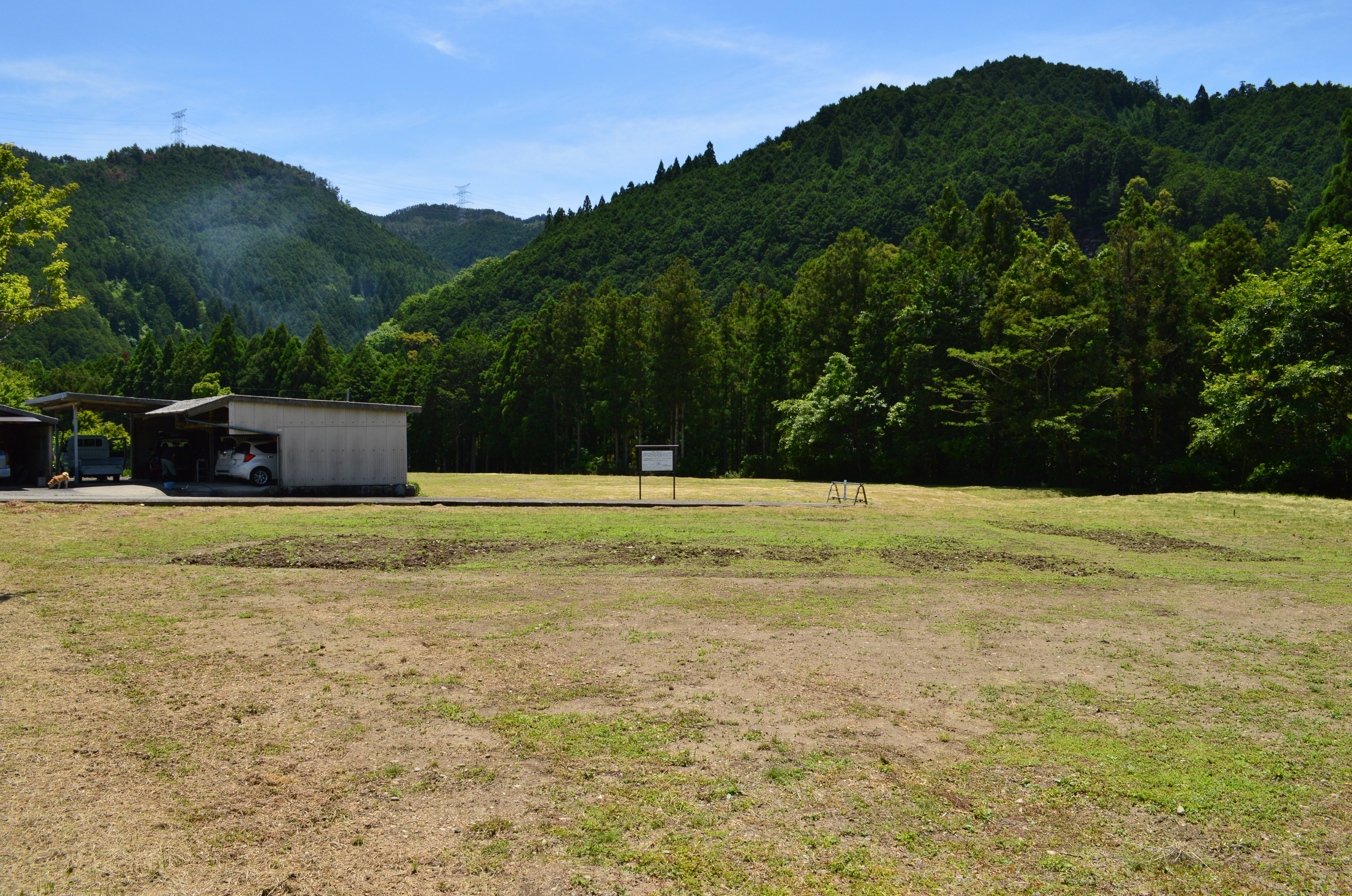 宮滝遺跡 大型建物跡 (SB4101)